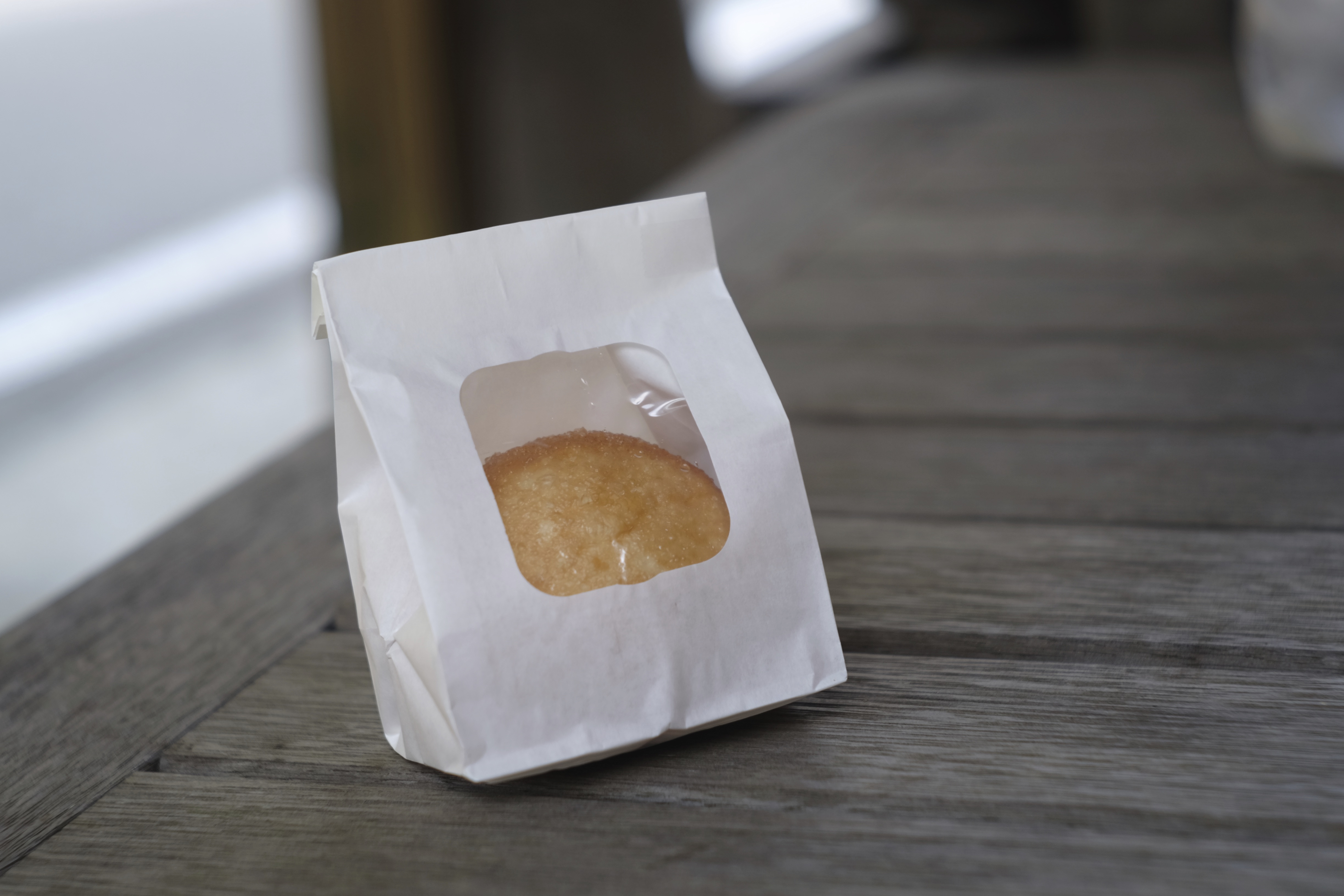 X-E2 Nikkor H.C 5cm F2